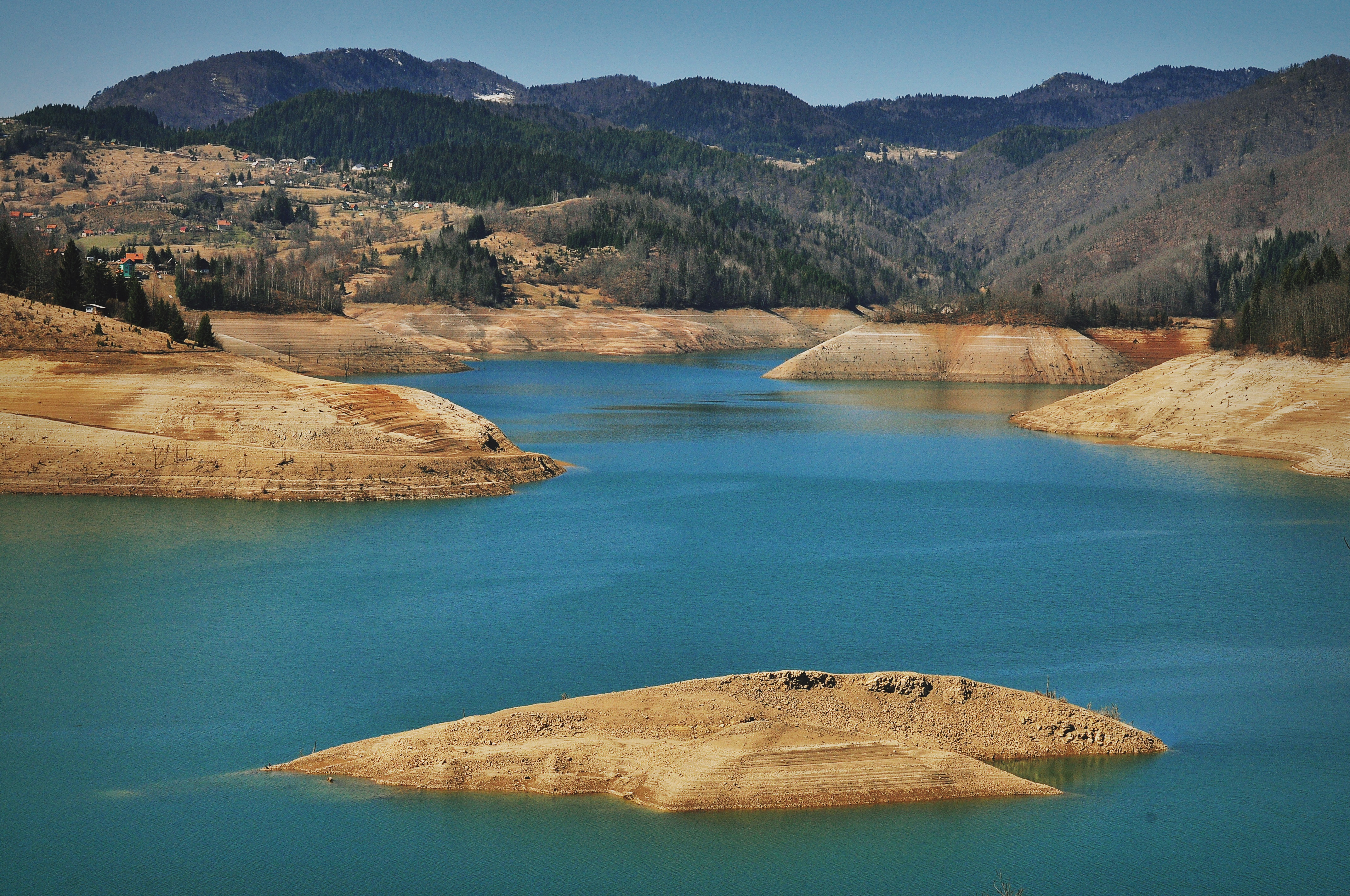 Језеро Заовине, Планина Тара Ово је фотографија заштићеног природног добра у Србији под шифром: НП03 This is a a photo of a natural area in Serbia with ID: НП03